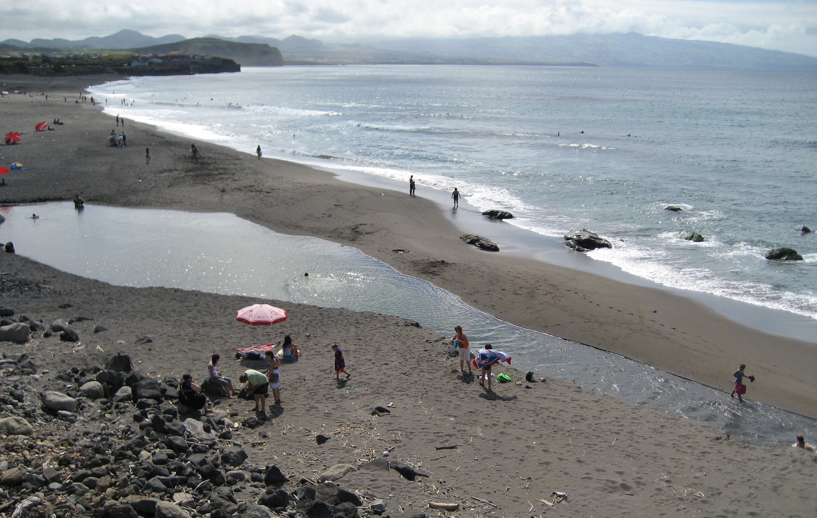 Ribeira Grande, Beach